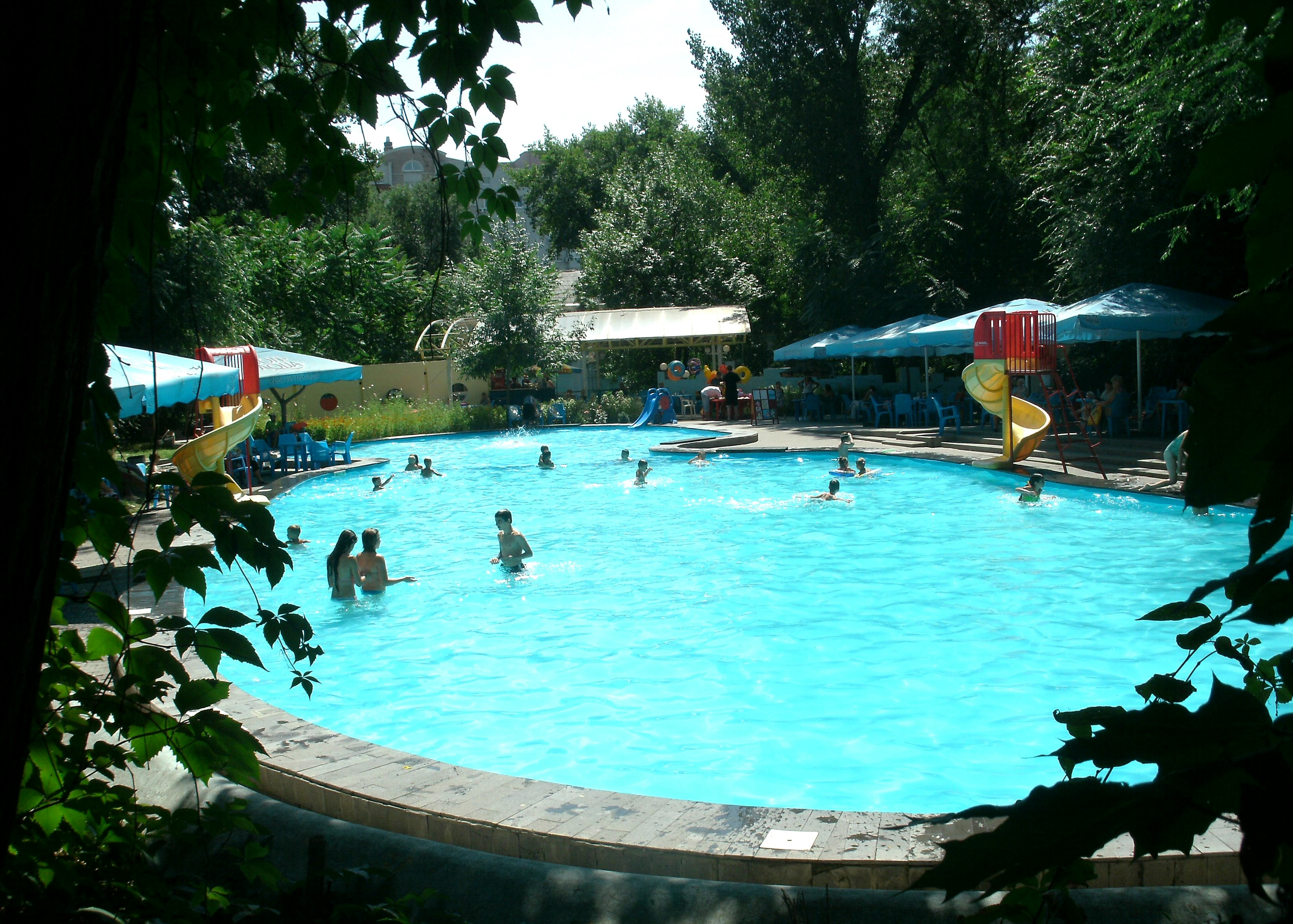 Бассейн в детском парке им. Вити Черевичкина